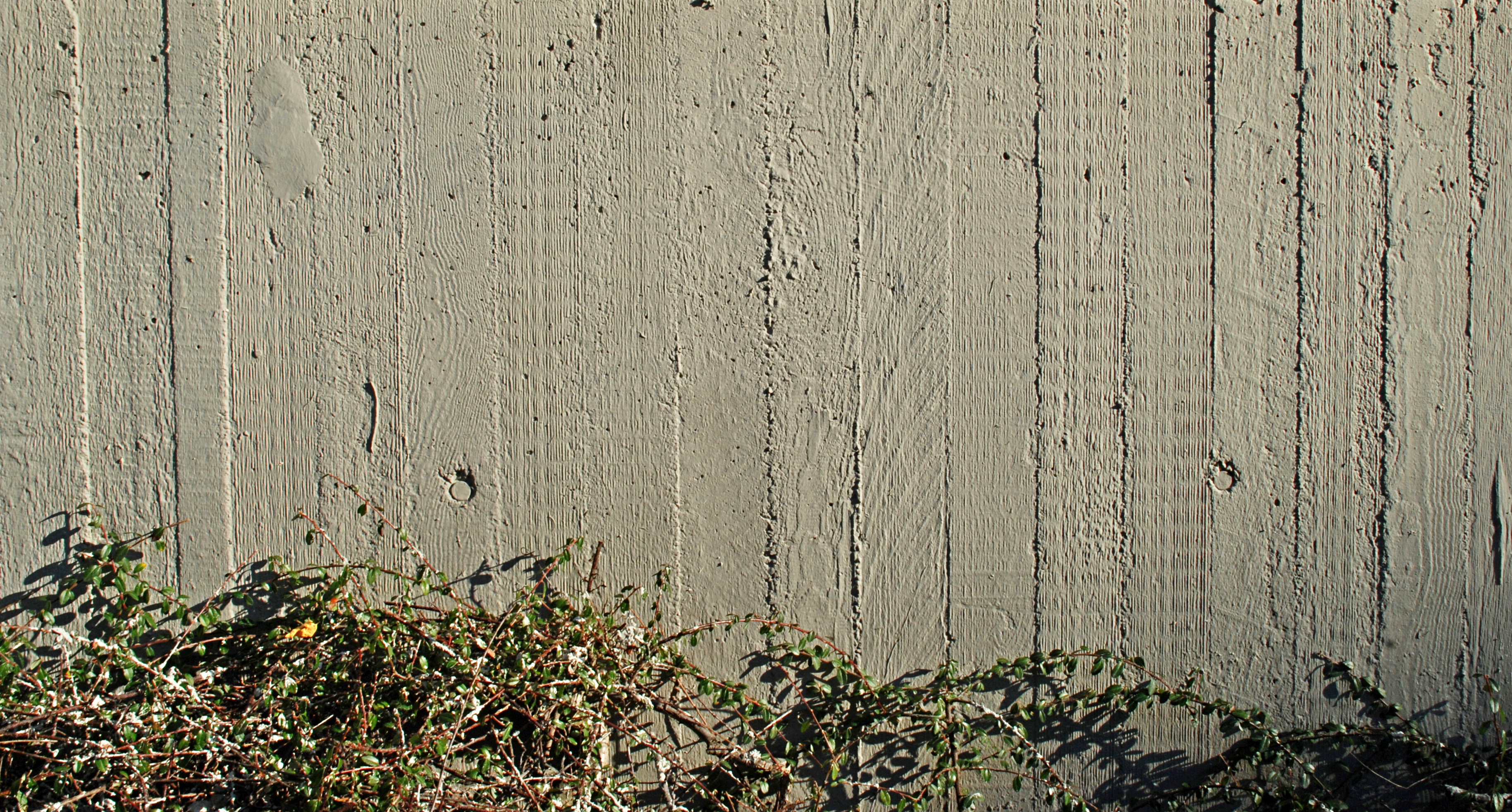 Belgique - Brabant wallon - Louvain-la-Neuve - Cyclotron (chemin du Cyclotron, architecture de style brutaliste, 1970-1972) : l'aspect béton brut